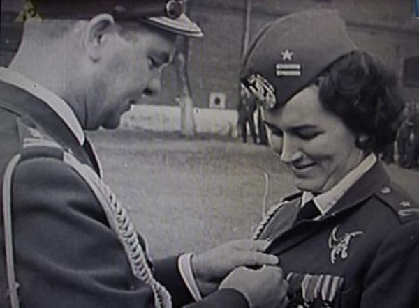 Dowódca 56. pś ppłk. pil. Bolesław Andrychowski odznacza mjr pil. Zofię Andrychowską, Inowrocław 1966r.